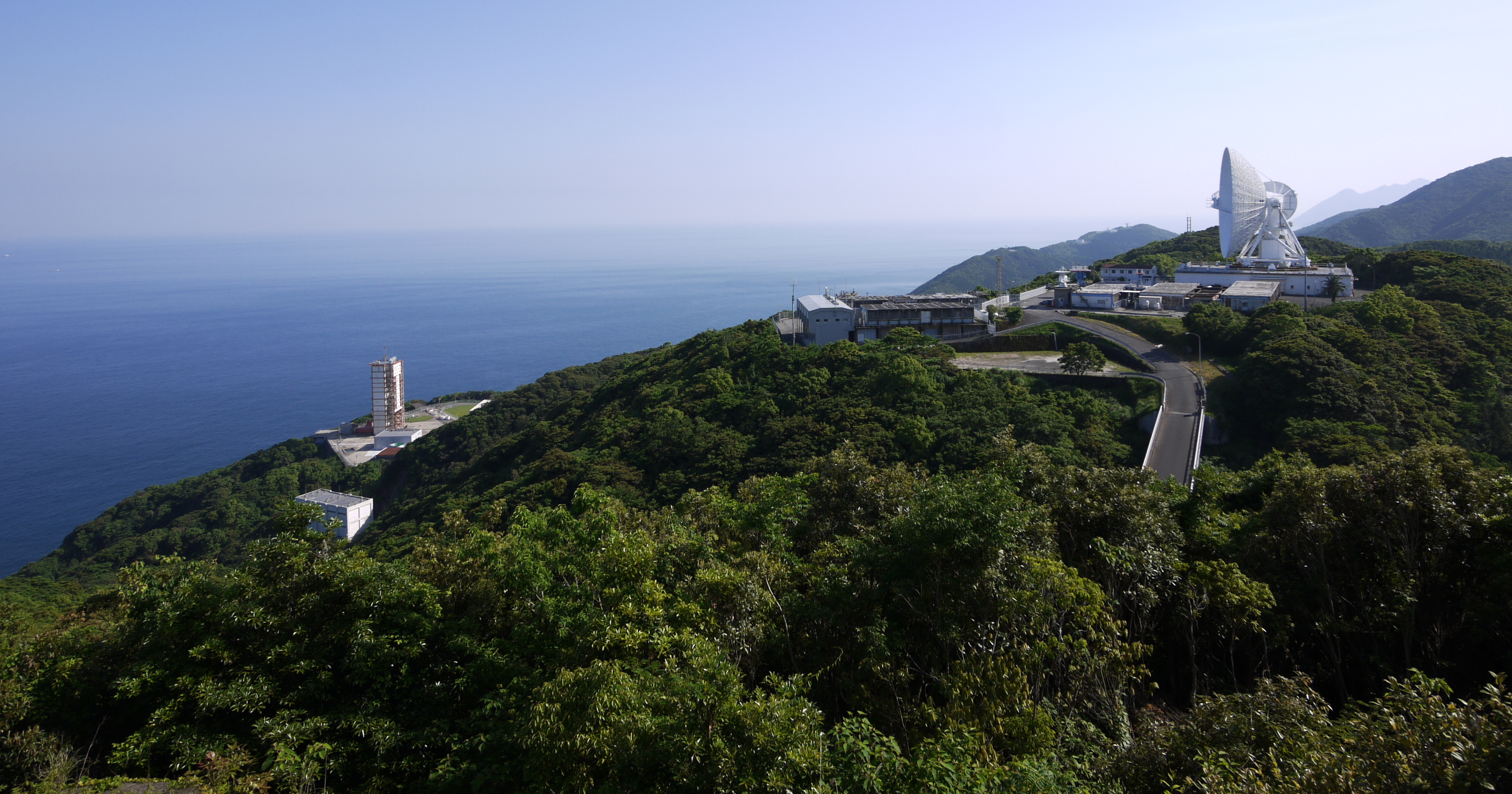 Vue d'ensemble du site très escarpé du centre spatial japonais de Uchinoura. On distingue à gauche le pas de tir principal et à droite une des antennes paraboliques.